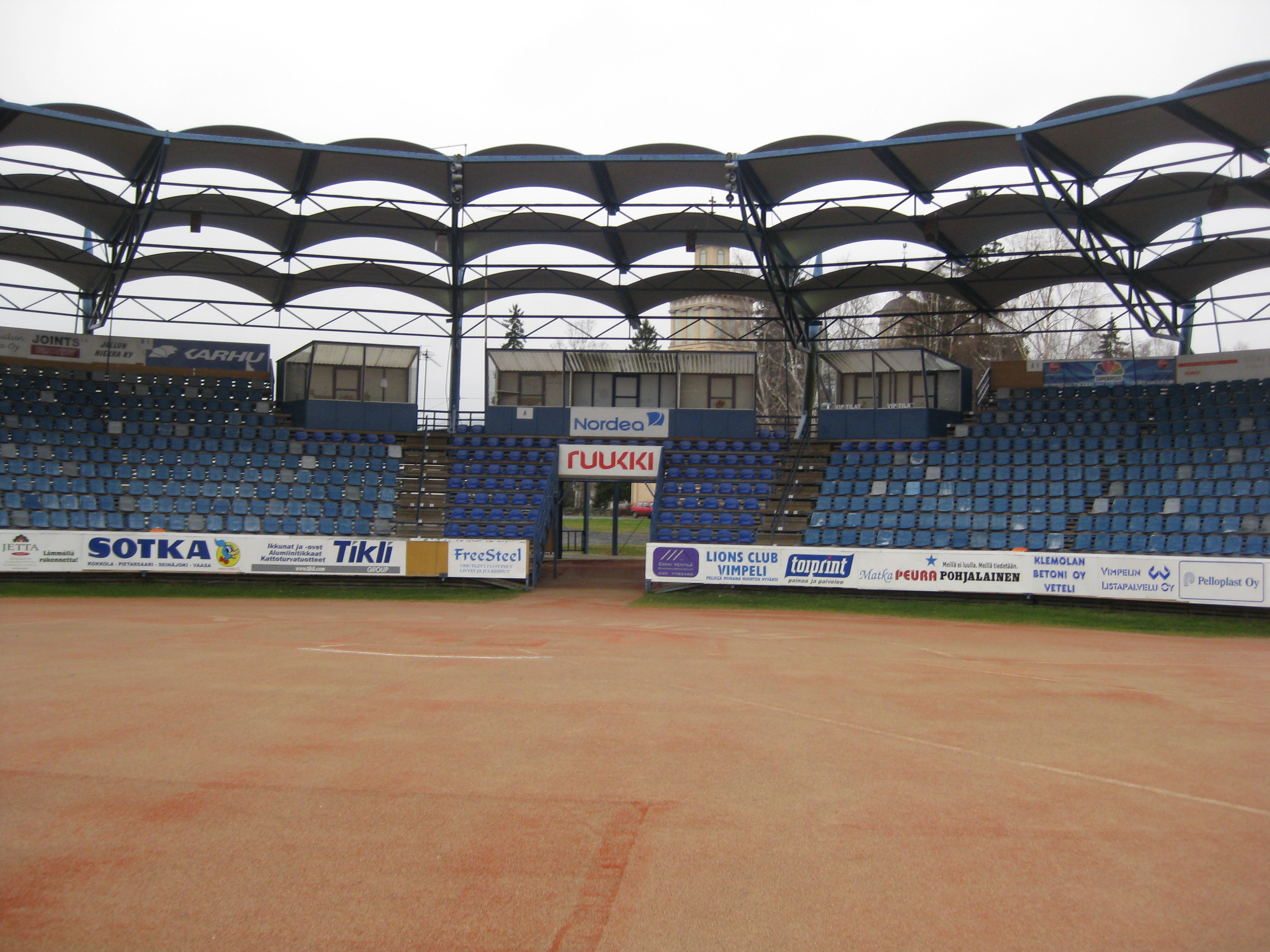 Saarikenttä